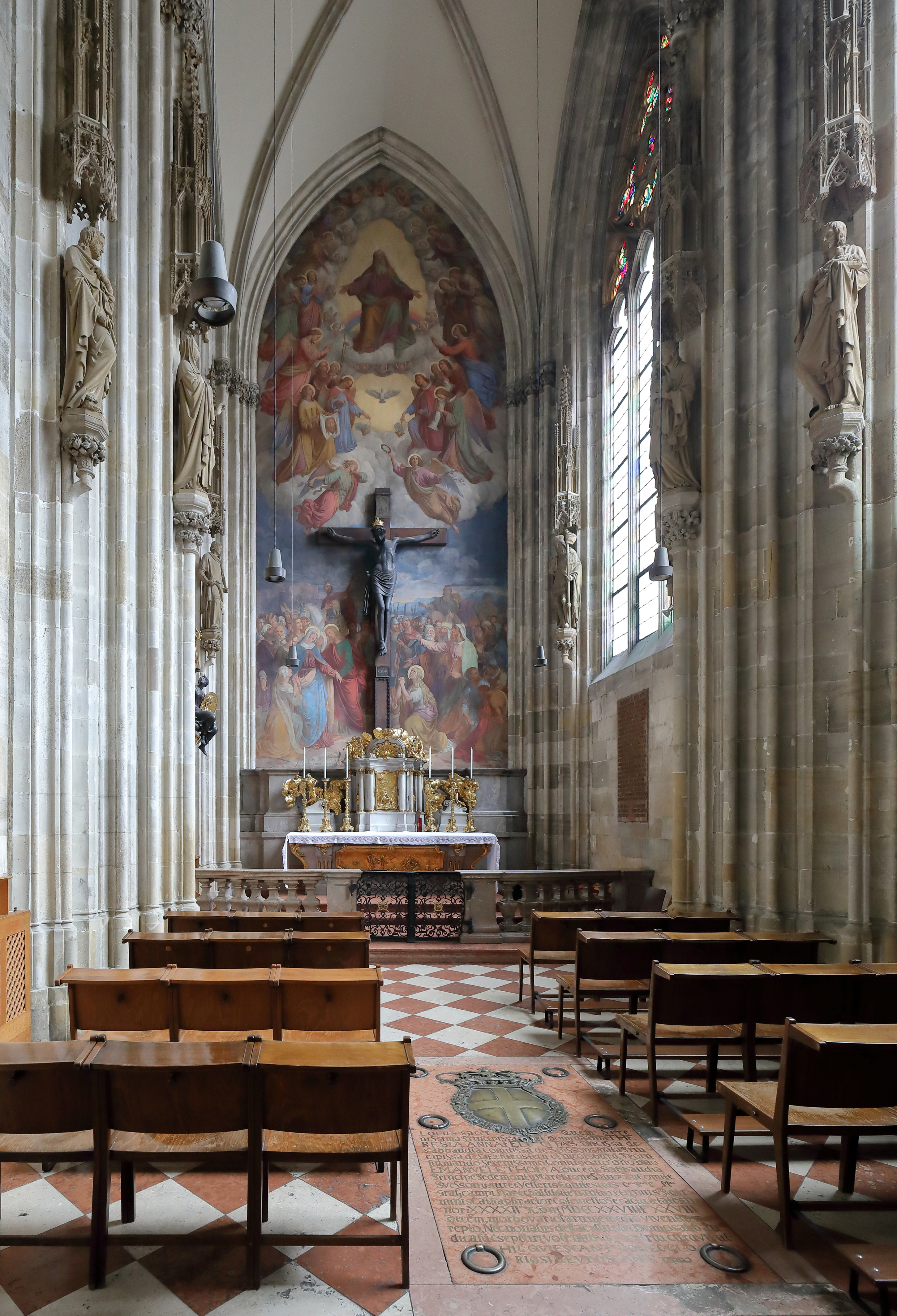 Die Kreuz- bzw. Prinz-Eugen-Kapelle im Stephansdom in der österreichischen Bundeshauptstadt Wien.Die Kapelle wurde von den Herren von Tirna, eine ritterliche Wiener Bürgerfamilie, gestiftet und zwischen 1358 und 1362 an der Nordwestecke des Domes errichtet. Wegen dem großen holzgeschnitzten Kruzifix, das man vor 1685 hier anbrachte, erhielt die Kapelle den Namen Kreuzkapelle. In der Gruft der Kapelle ist Prinz Eugen von Savoyen († 1736) und Emanuel Thomas von Savoyen († 1729), ein Neffe Prinz Eugens, beigesetzt. Ab 1852 wurde die Kreuzkapelle umgestaltet. Unter anderem erhielt dabei in Ergänzung zu dem spätgotischen Kruzifix die Altarwand ein Fresko, das die Ereignisse auf Golgotha darstellt und das Johann Ender 1853 malte.